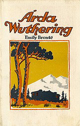 Clúdach 'Árda Wuthering'